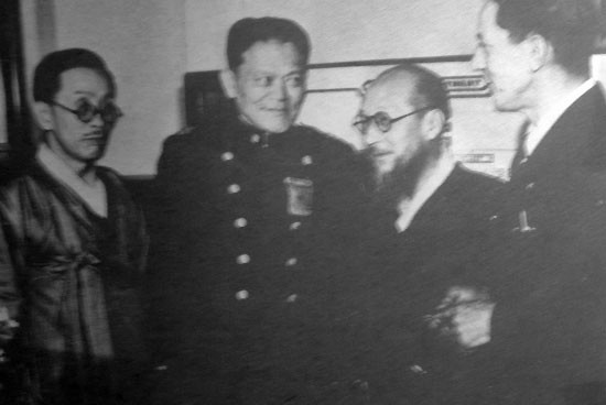 김우평, 조병옥 경무부장, 최동오, 주한미국총영사 무초(왼쪽부터), 1946년